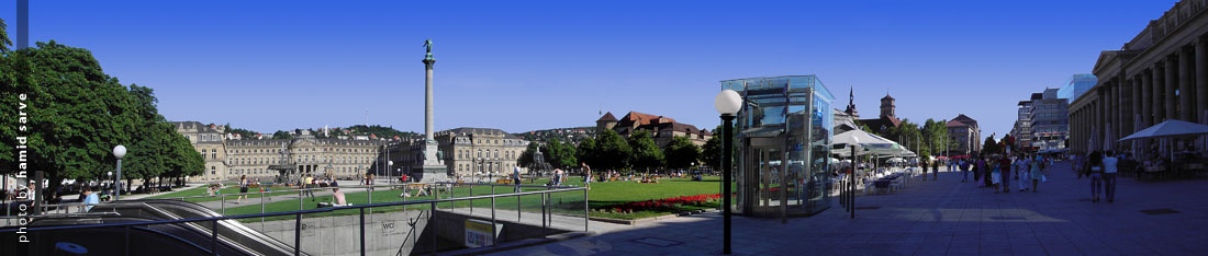 Foto: Hamid Sarve